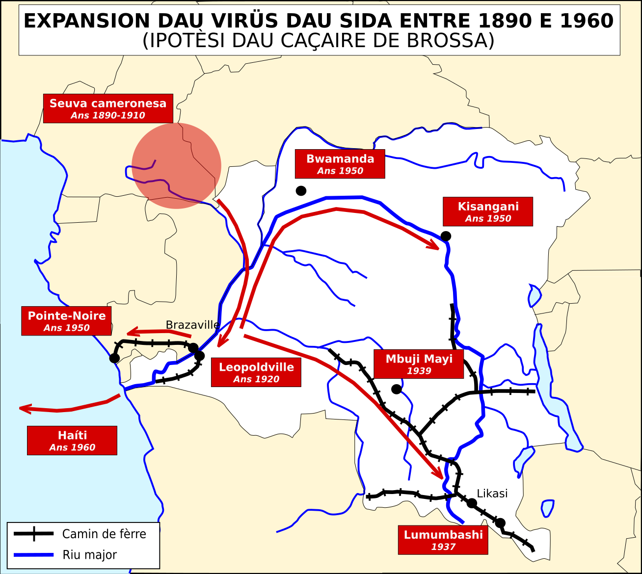 Propagacion dau virüs de l'immunodeficiéncia umana segon l'ipotèsi dau caçaire de brossa